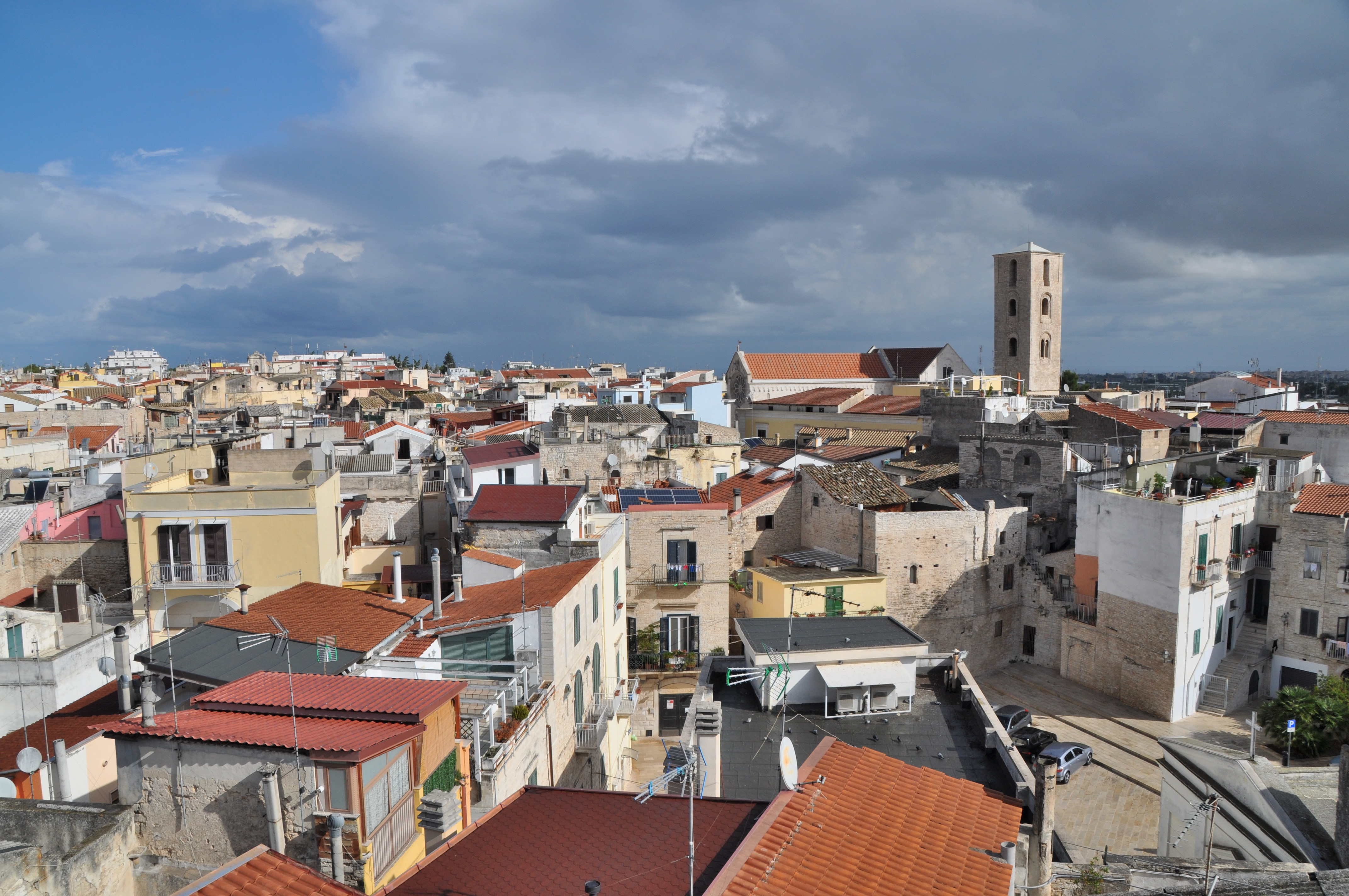 Ruvo di Puglia, vue depuis la tour de l'orologe (veduta della Torre dell'Orologio)